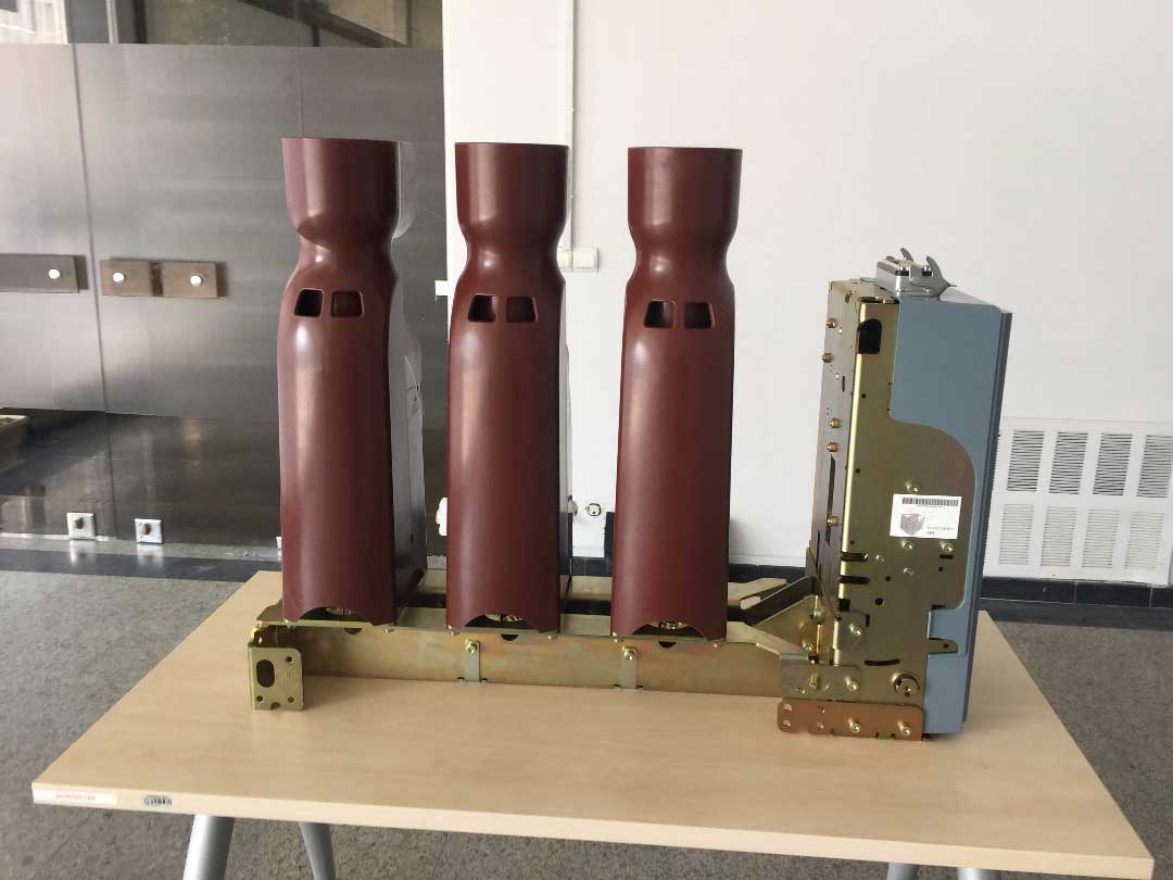 کلید کمپکت خلا شرکت زیمنس آلمان مدل SIONL نماینده اصلی این کلید در ایران شرکت توان پیشتاز کلید است. این تیپ کلید در تابلو های کمکت فشار متوسط مورد استفاده قرار میگیرد.